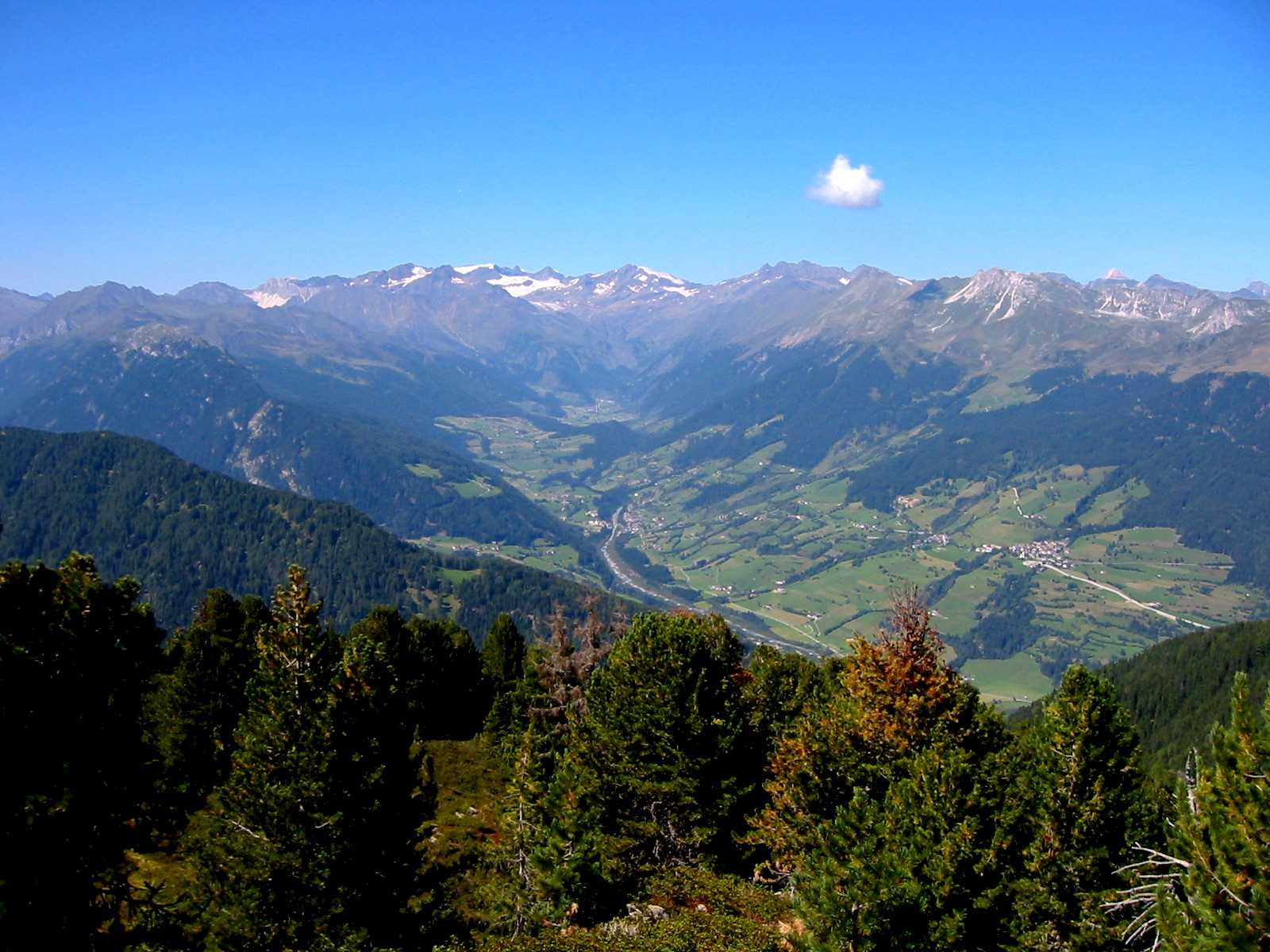 Das Ridnauntal. In der Bildmitte hinten der Schneeberg, rechts erheben sich die Stubaier Alpen. Am Berghang rechts ist das Dorf Telfes zu sehen, wahrscheinlich die älteste Ansiedlung im Tal.